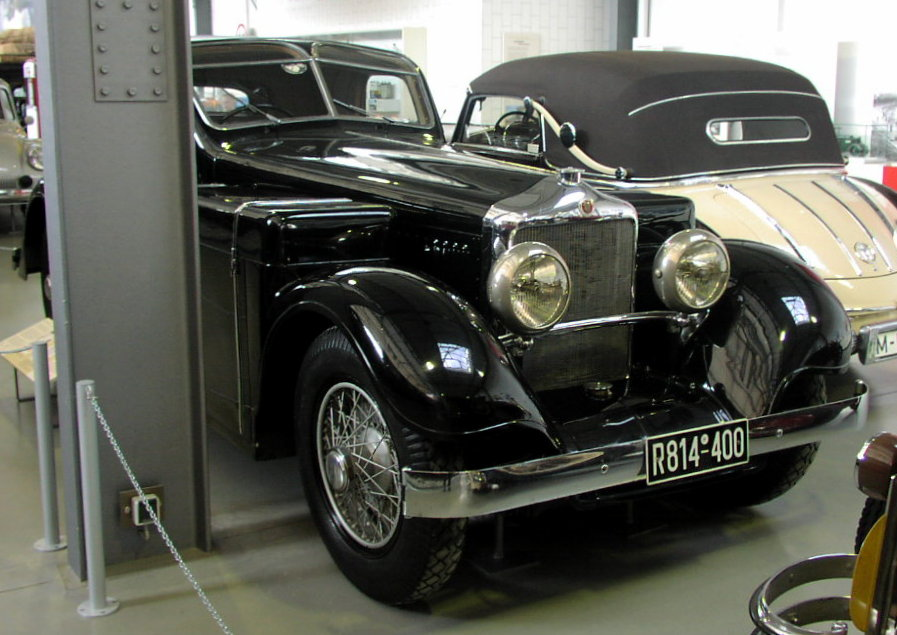 Minerva 32 CV AKS (1932)